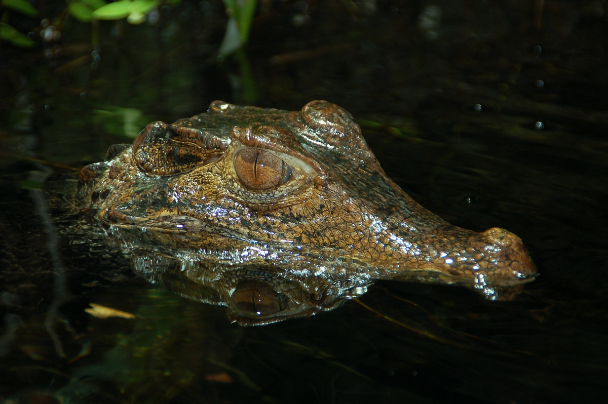 Brauen-Glattstirnkaiman Paleosuchus palpebrosus, Tierpark, Bochum, Deutschland